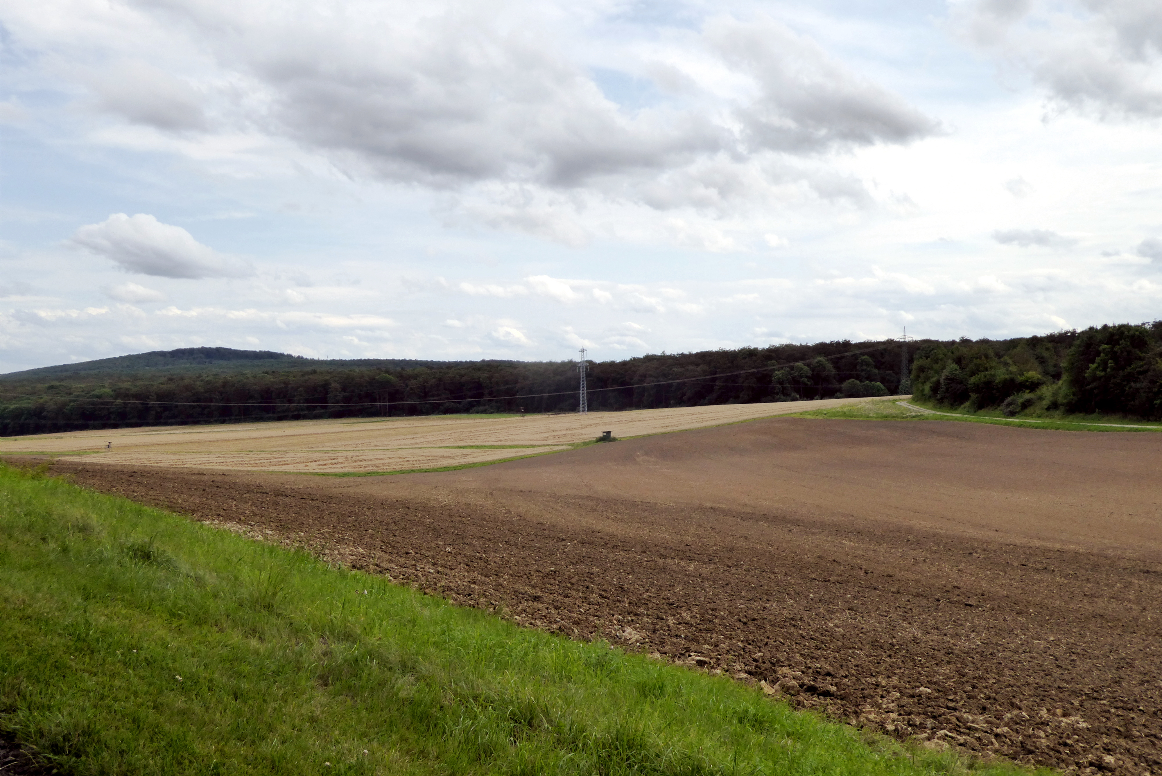 Blick von Nordwesten auf die Lage der Ortswüstung Vriemeensen (unter Acker) bei Meensen, Gemeinde Scheden, Südniedersachsen